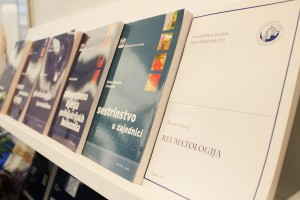 Izdavačka djelatnost Zdravstvenog veleučilišta.